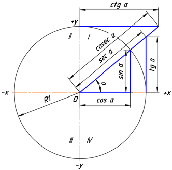 Եռանկյունաչափական ֆունկցիաներ, R=1